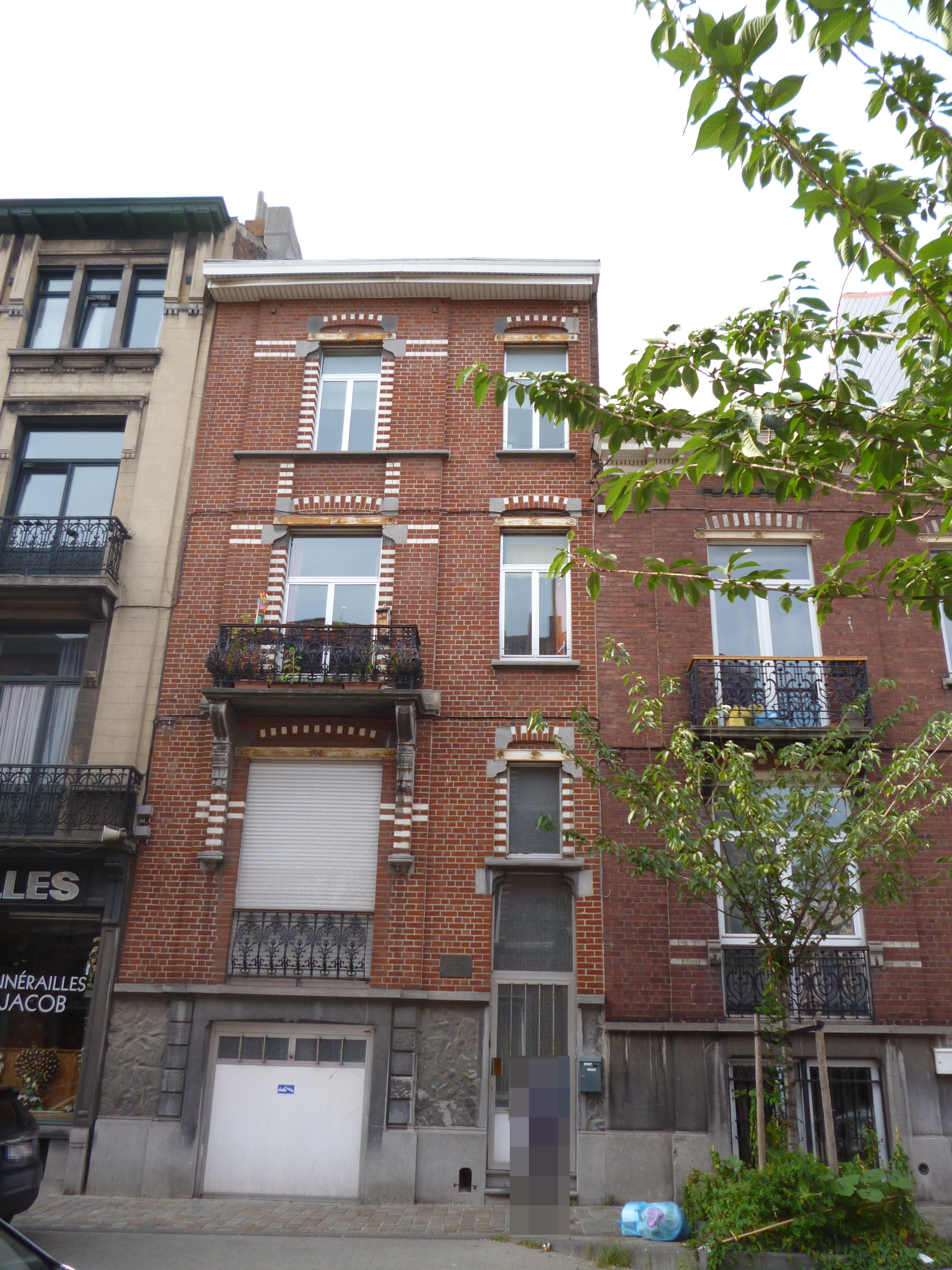 Hier ist am 22.Mai 1907 der belgische Comiczeichner Hergé geboren. Es erinnert nur noch eine Gedenktafel. Die Straße heißt Rue Philippe Baucq 33. 1907 hatte sie noch den Namen Rue Cranz 25.